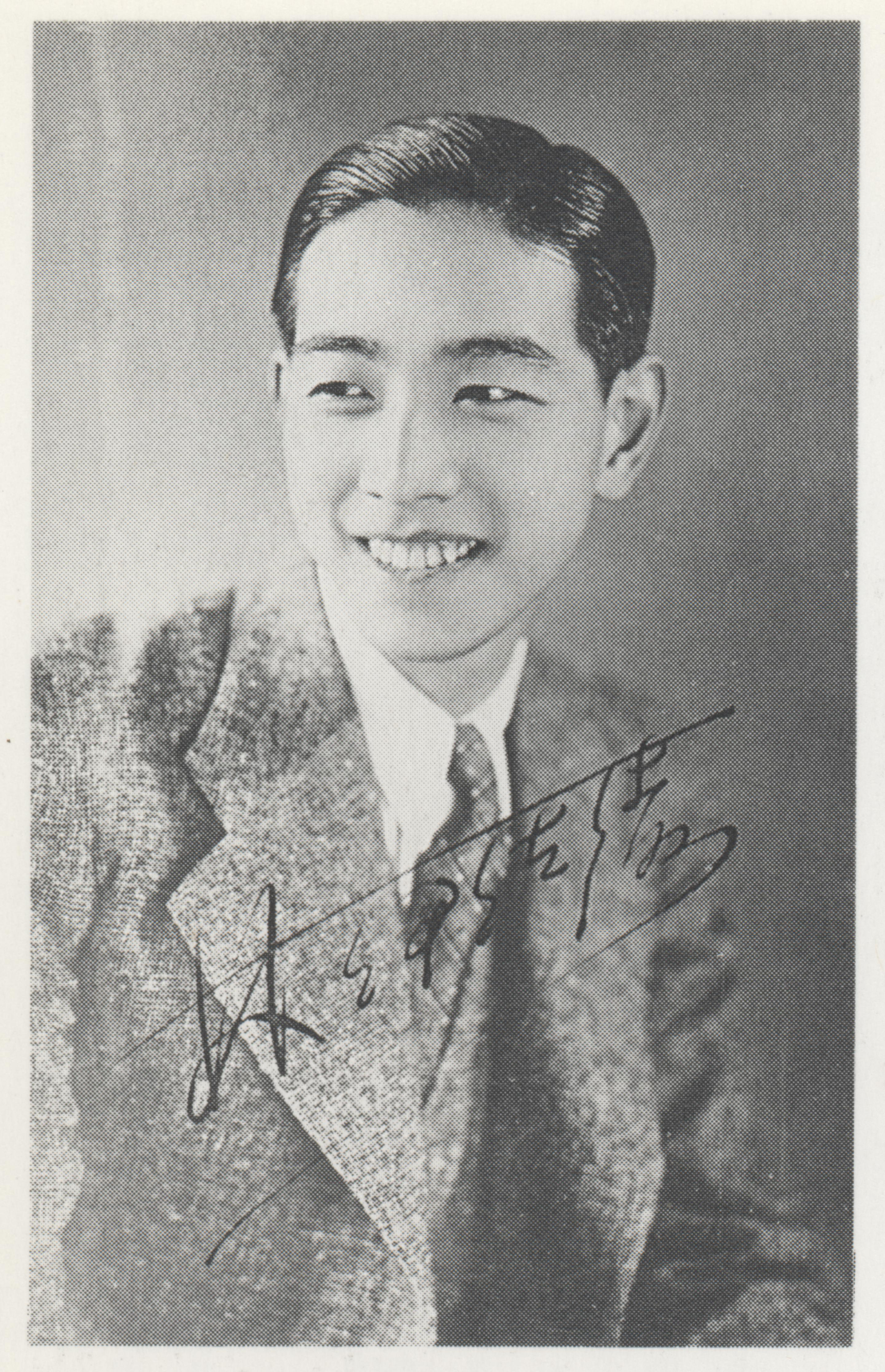 1930年代に宣伝用として使用されたスチールをスキャナでスキャン